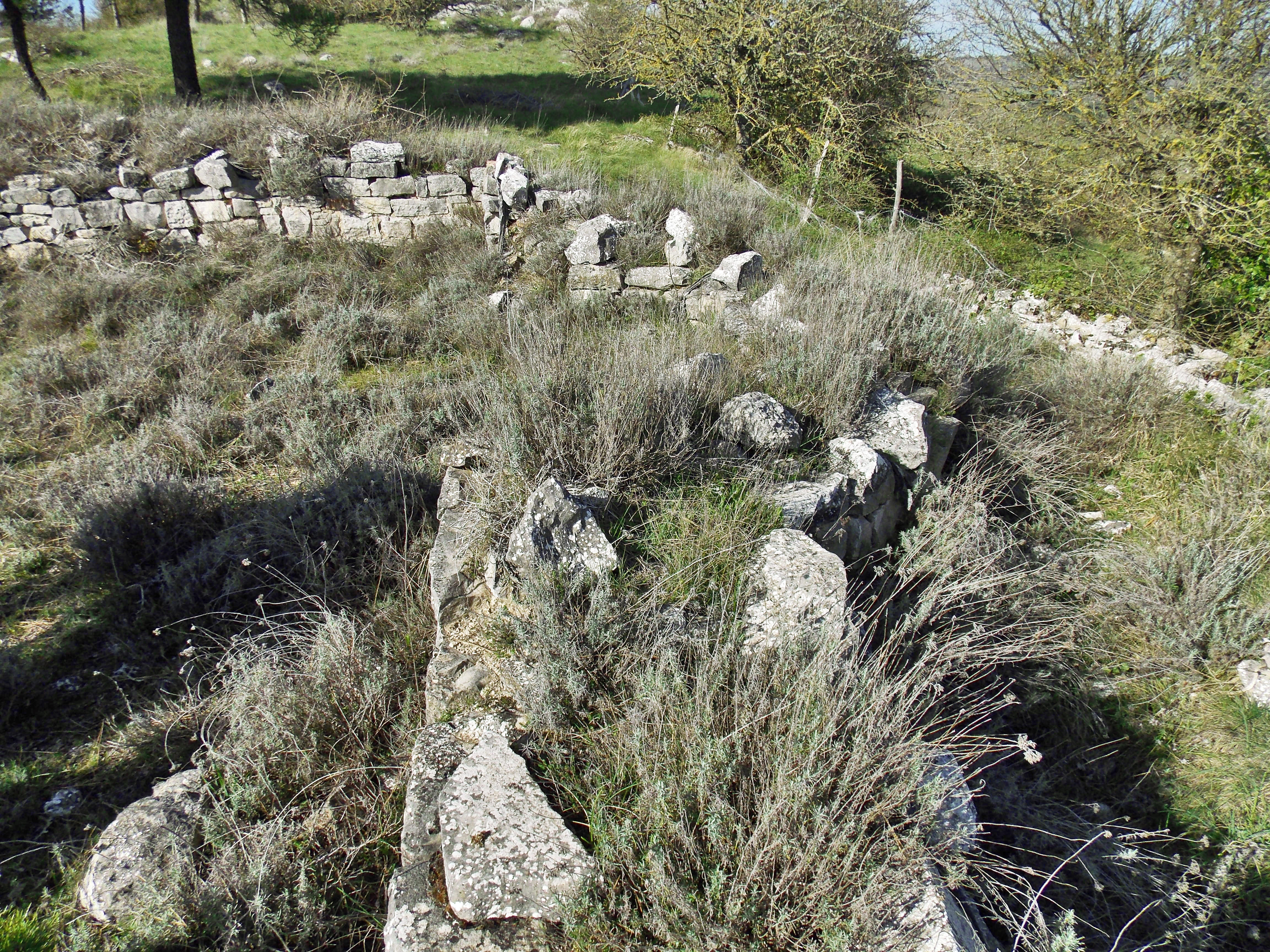 L'area archeologica di Monte Chiodo a Buonalbergo, in provincia di Benevento: abside della chiesa